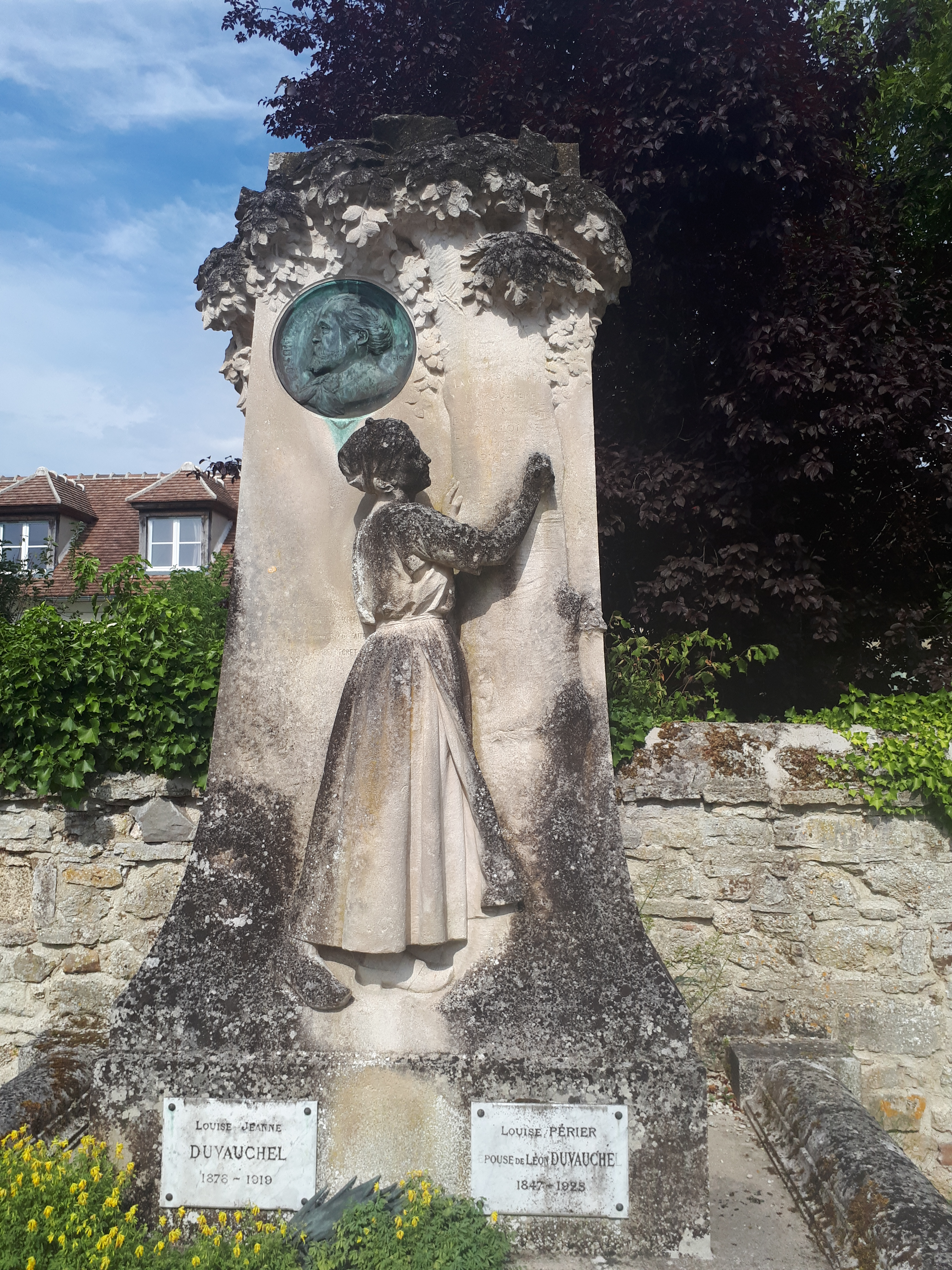 Tombe de Léon Duvauchel, de sa femme et de sa fille à Saint-Jean-aux-Bois (Oise)